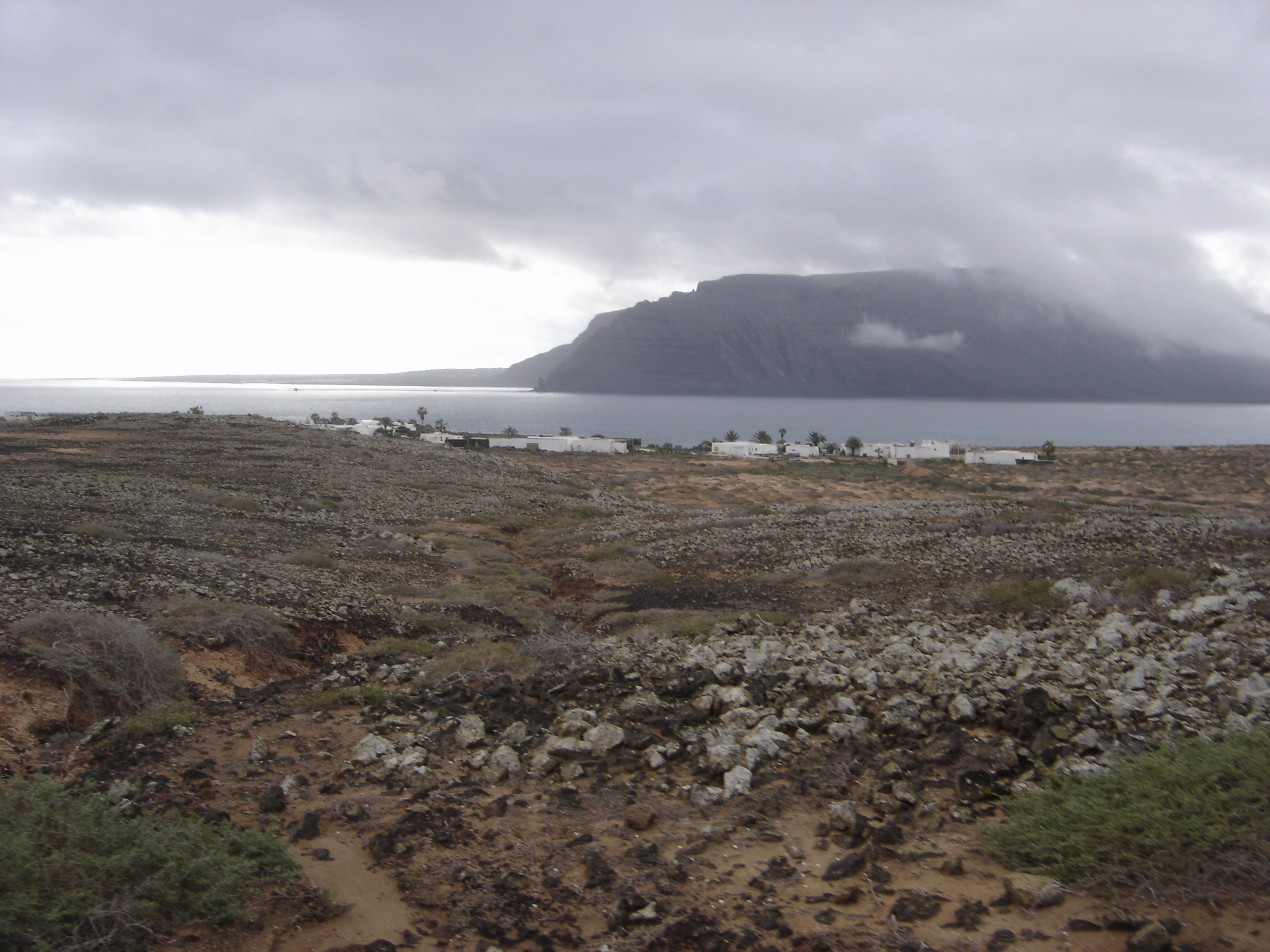 Vue sur le hameau de Pedro Barba (île de la Graciosa) - en arrière-plan, l'île de Lanzarote